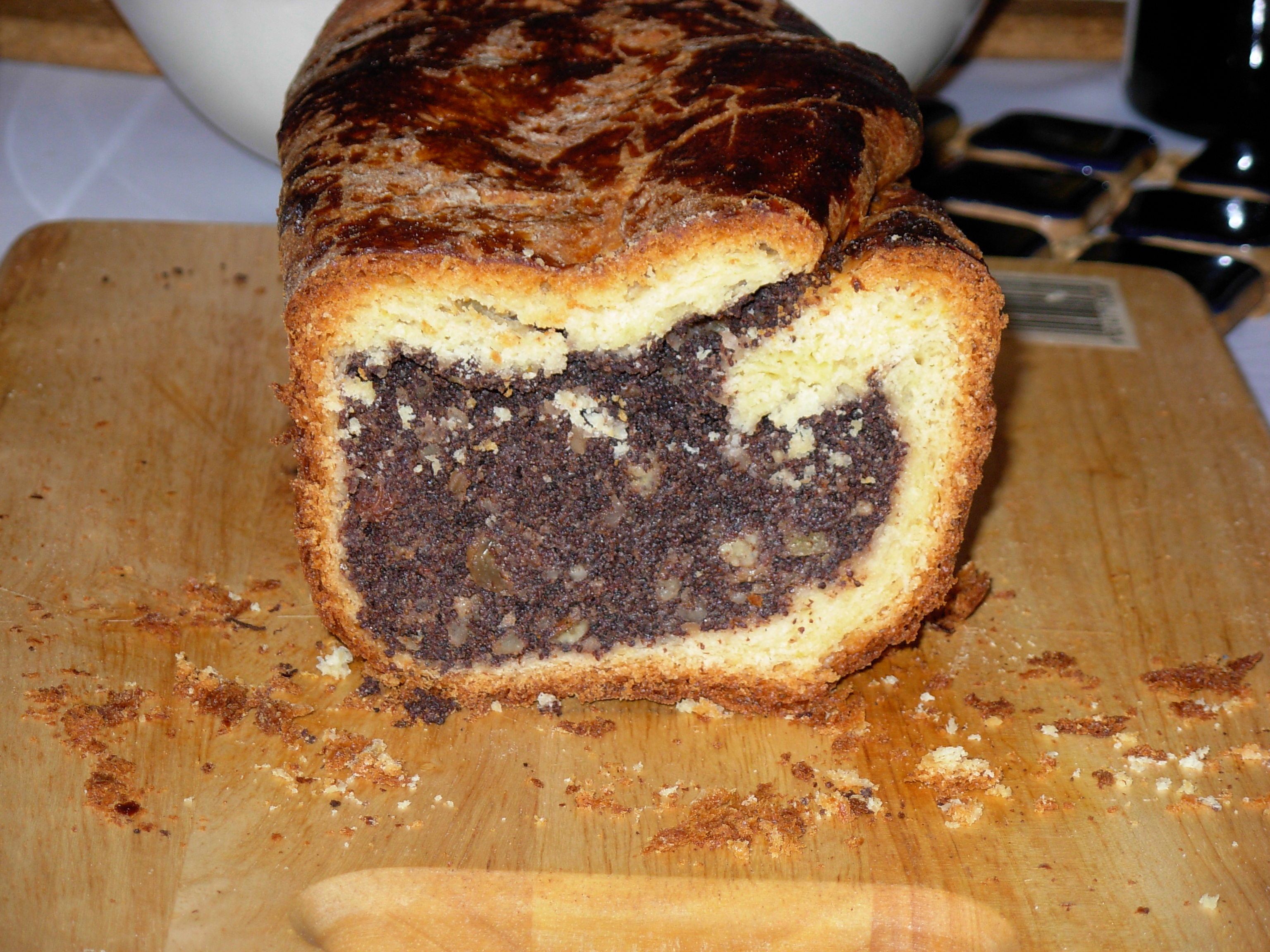 Makowiec (ciasto) Photo by myself.